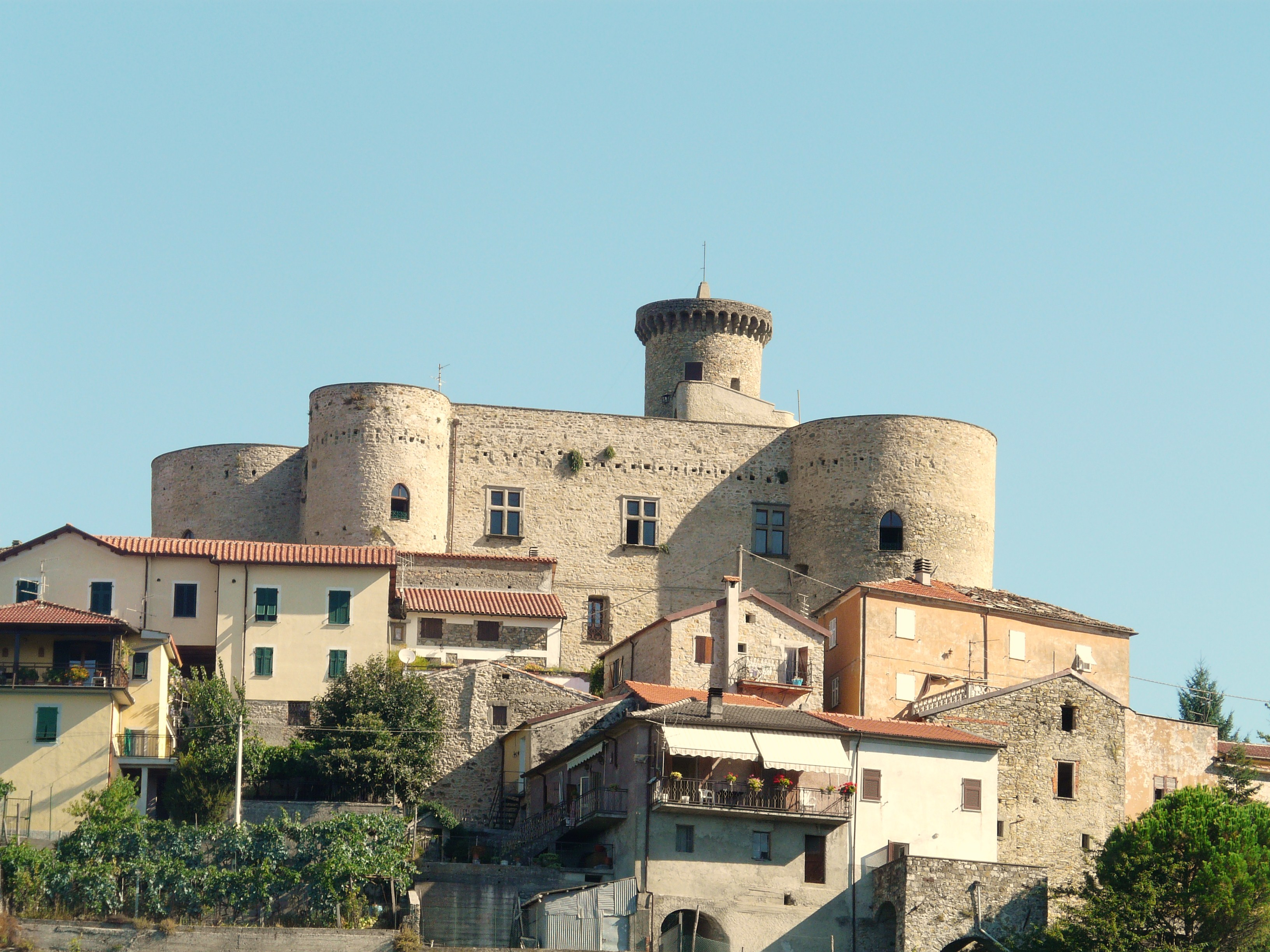 Castello della Bastia, Licciana Nardi, Toscana, Italia